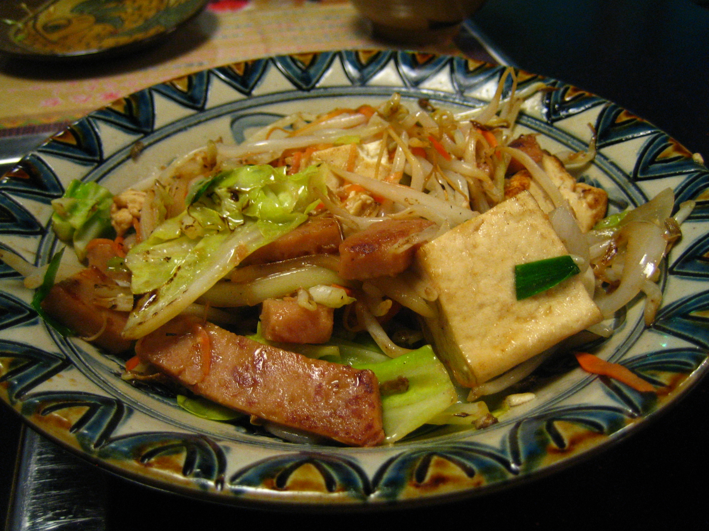 at Churasan-Ya, Monzen-nakachou, Tokyo